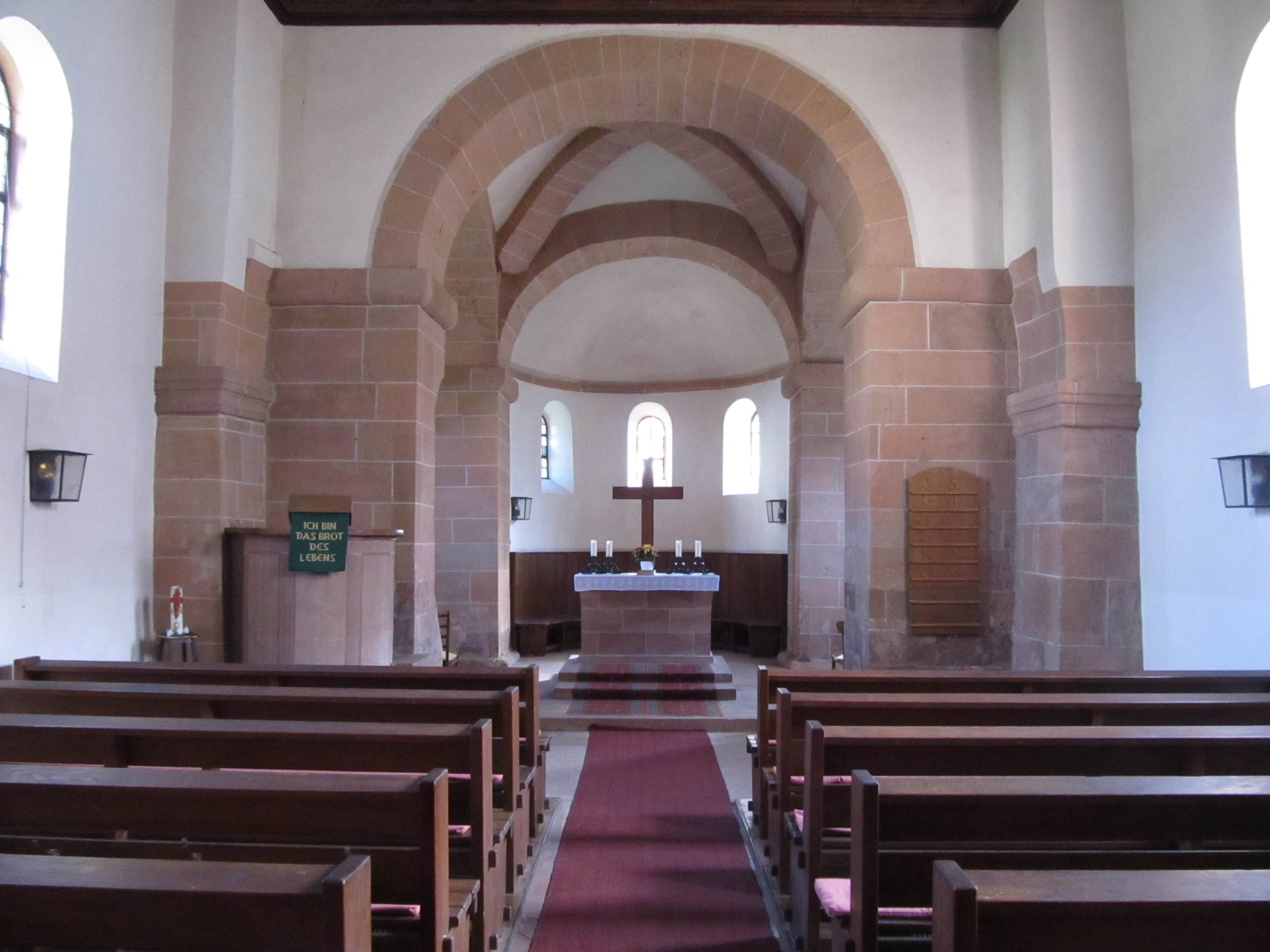 Blick ins Innere der protestantischen Stephanuskirche in Böckweiler, einem Stadtteil von Blieskastel, Saarland